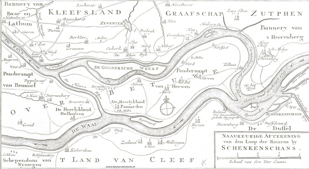 De Oude Rijn en het Pannerdensch Kanaal (hier Nieuwe Rijn geheten)